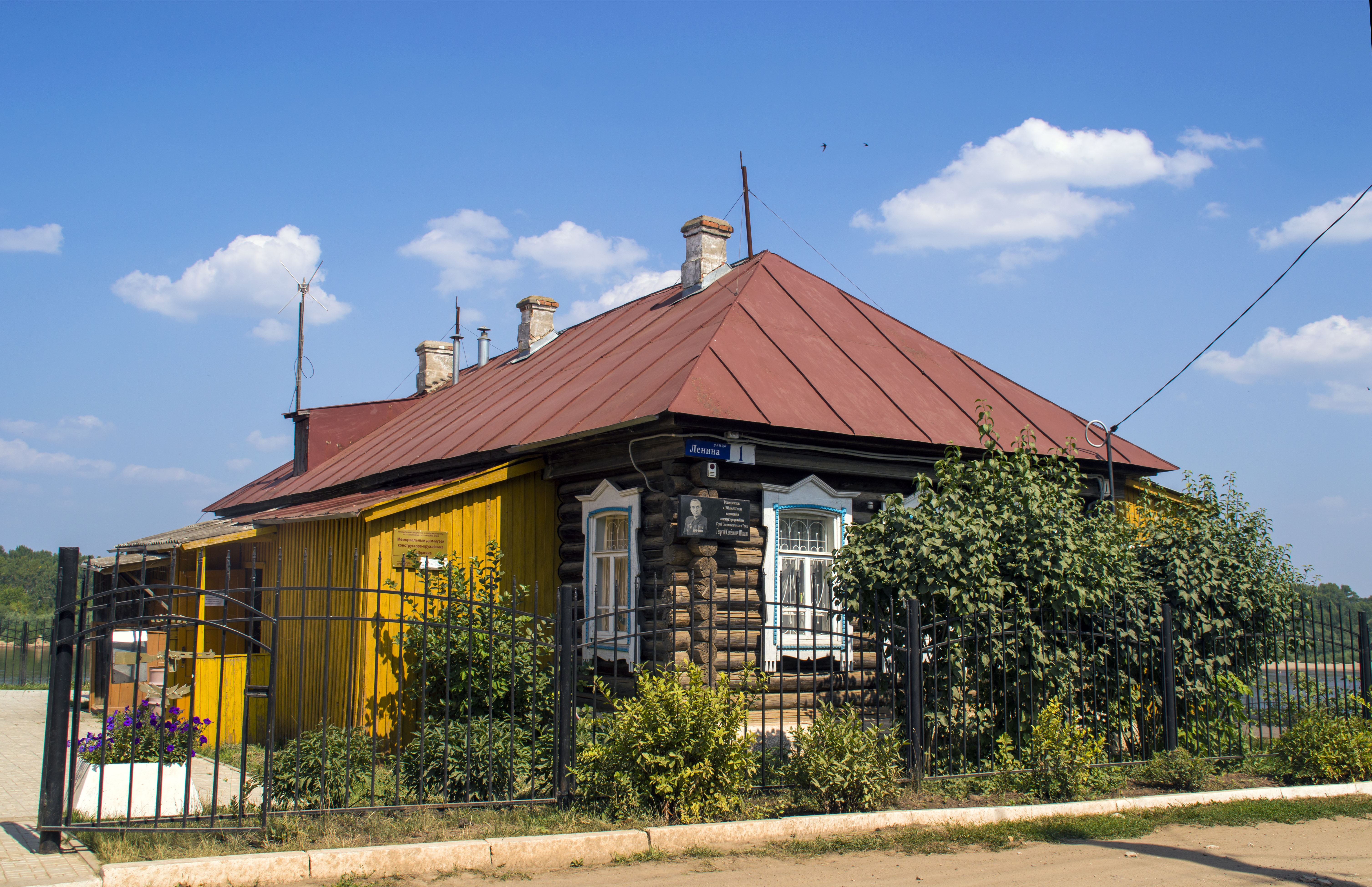 Дом, в котором жил и работал конструктор-оружейник Герой Социалистического труда Шпагин Г.С.: улица Ленина, 1, Вятские Поляны, Кировская область